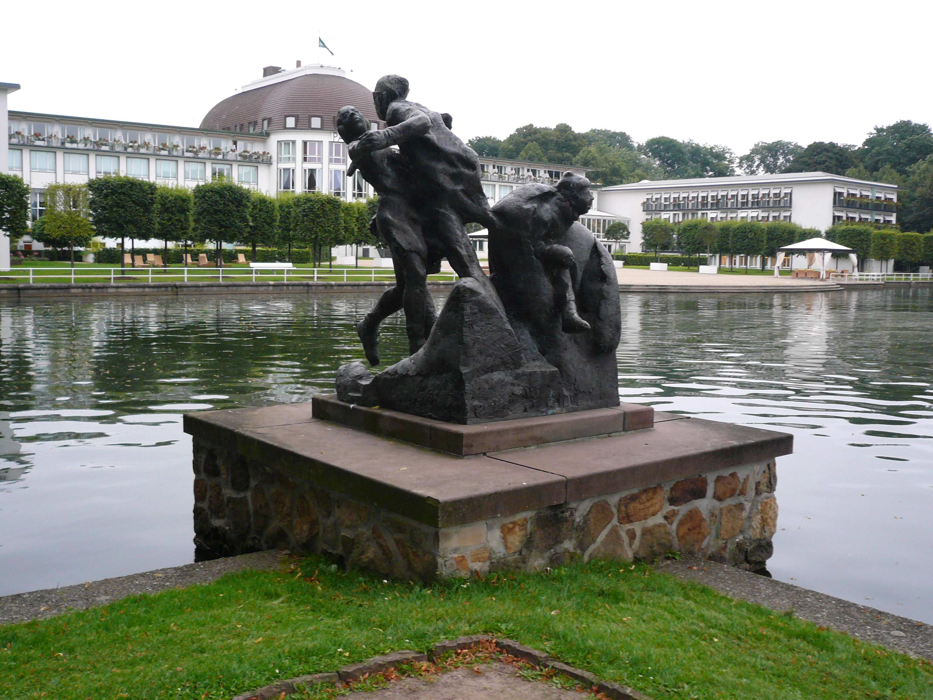 Skulptur am Hollersee in Bremen